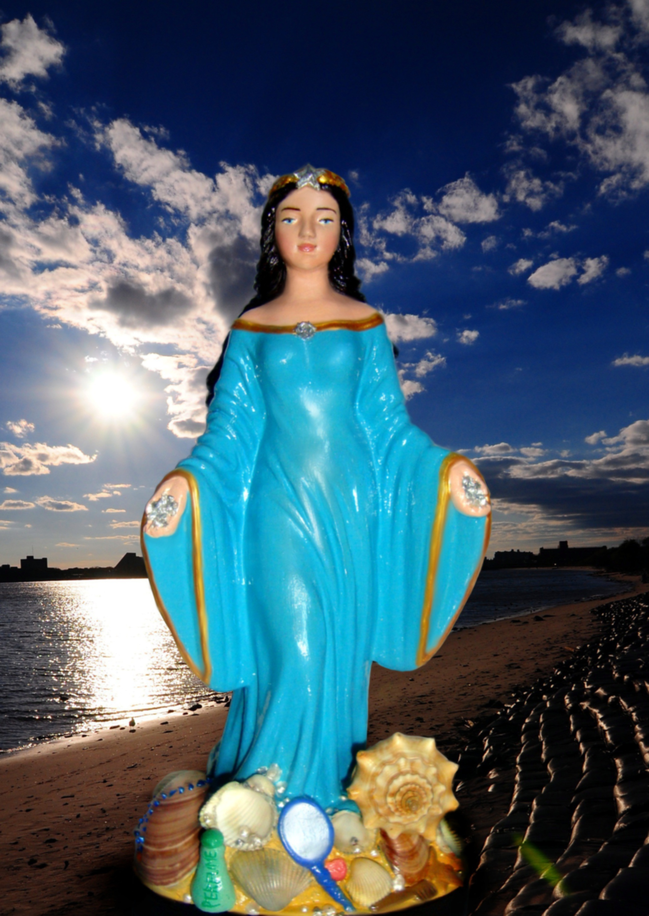 Policromia de imagem popular e fotografia feitas por mim, com montagem com a imagem de nome Coney_island que está carregada no Wikimedia Commons como domínio público.